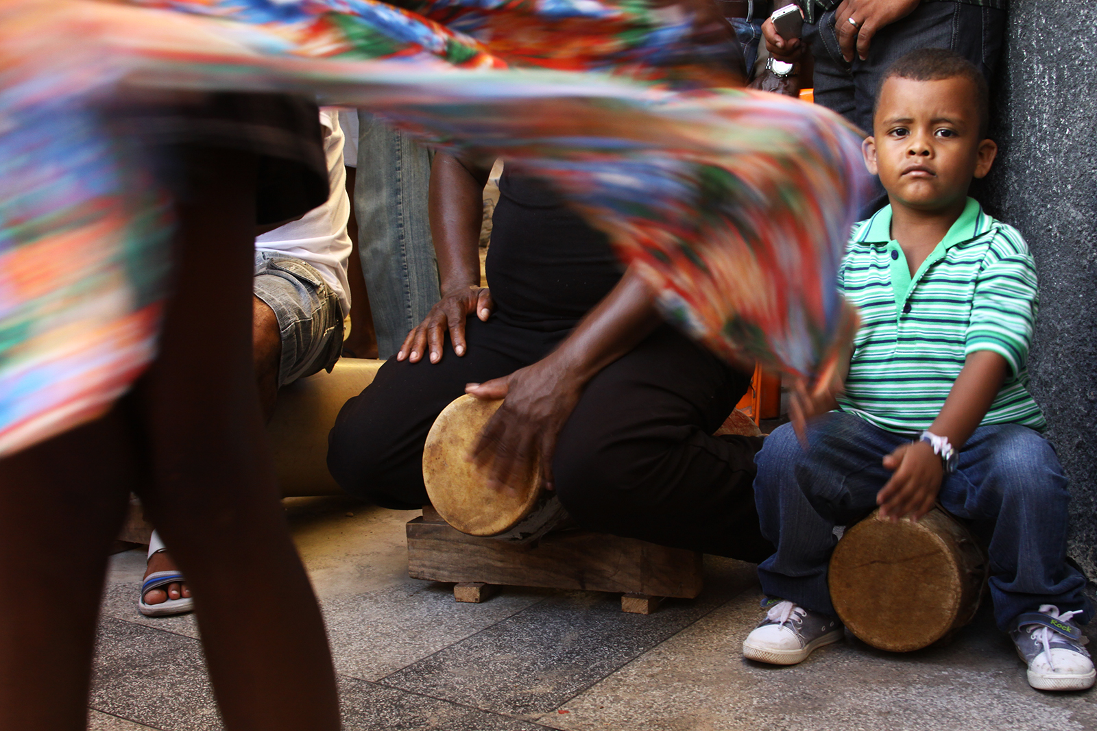 na festa de são João em são Luis, existem varias manifestações culturais uma dela e o tambor de crioula um herança africana bem forte no tambor de crioula em são Luis...